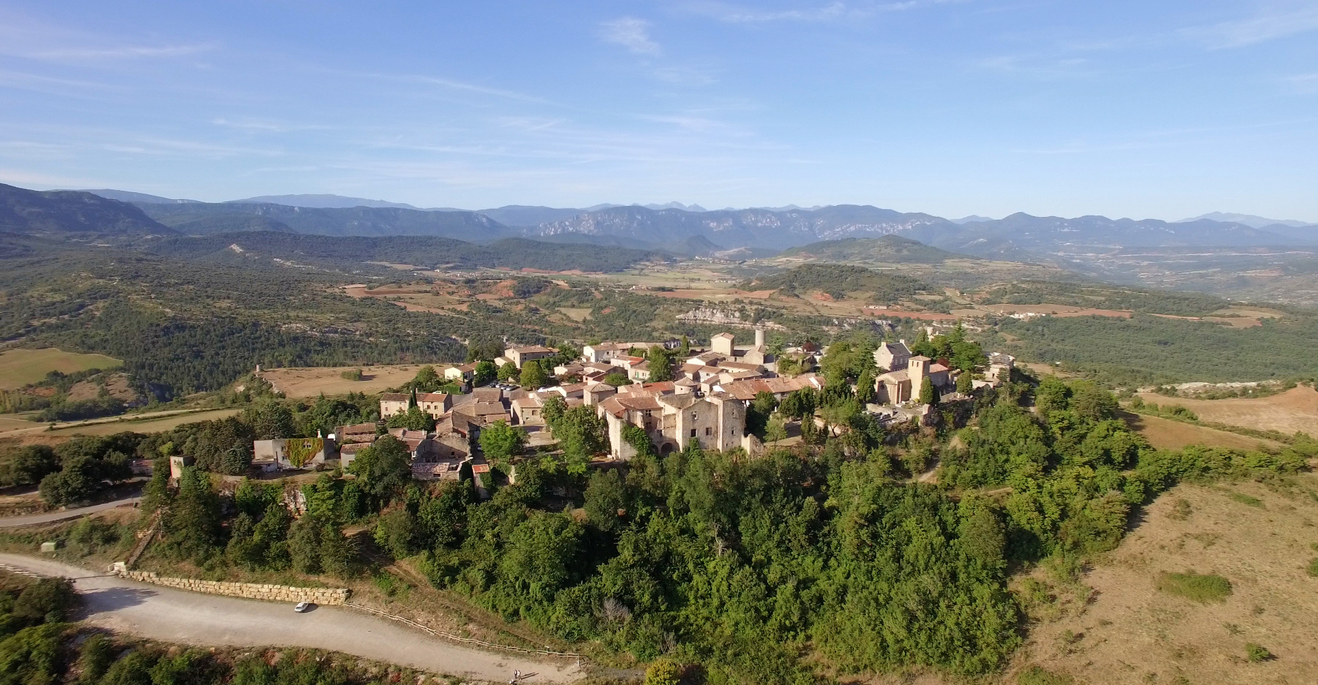 vue aérienne de Rennes-le-Château